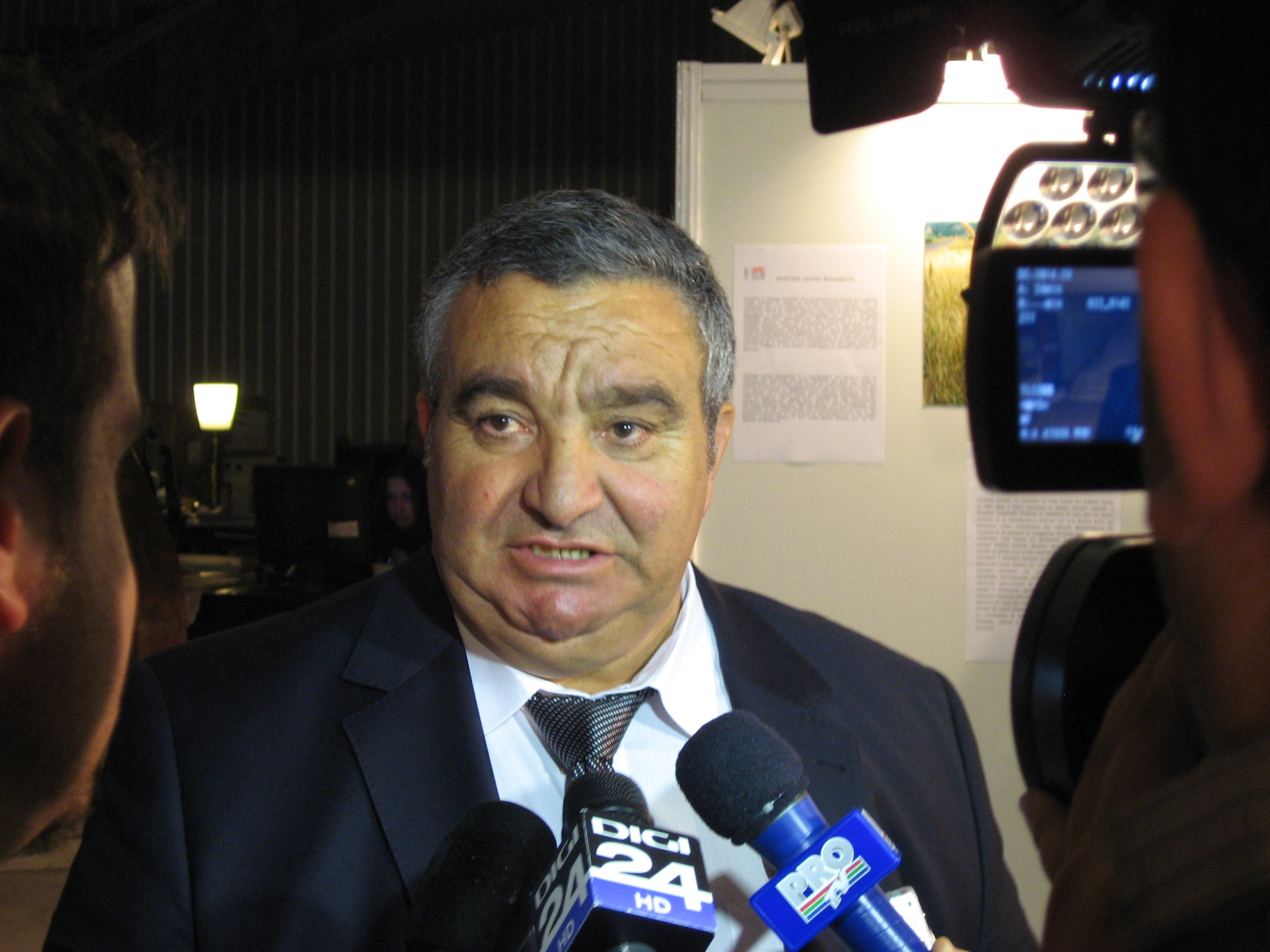 Florin Cioabă, Vertreter der Volksgruppe der Roma in Rumänien und selbsternannter „König der Roma“, bei der Präsentation seines Films „Adevarul despre Holocaust“ am Astra-Filmfestival 2012 in Hermannstadt